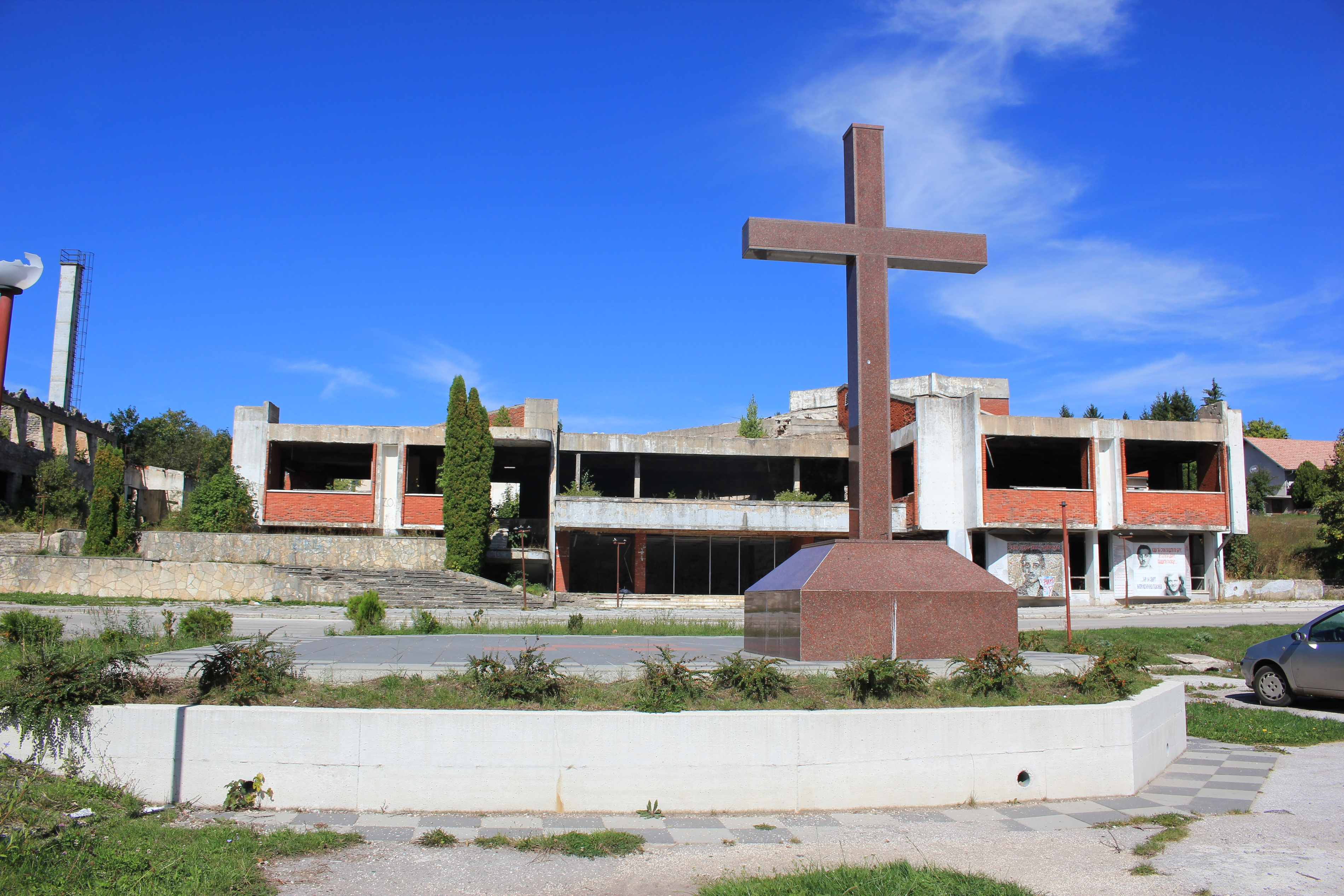 Ortszentrum von Bosansko Grahovo, Bosnien.